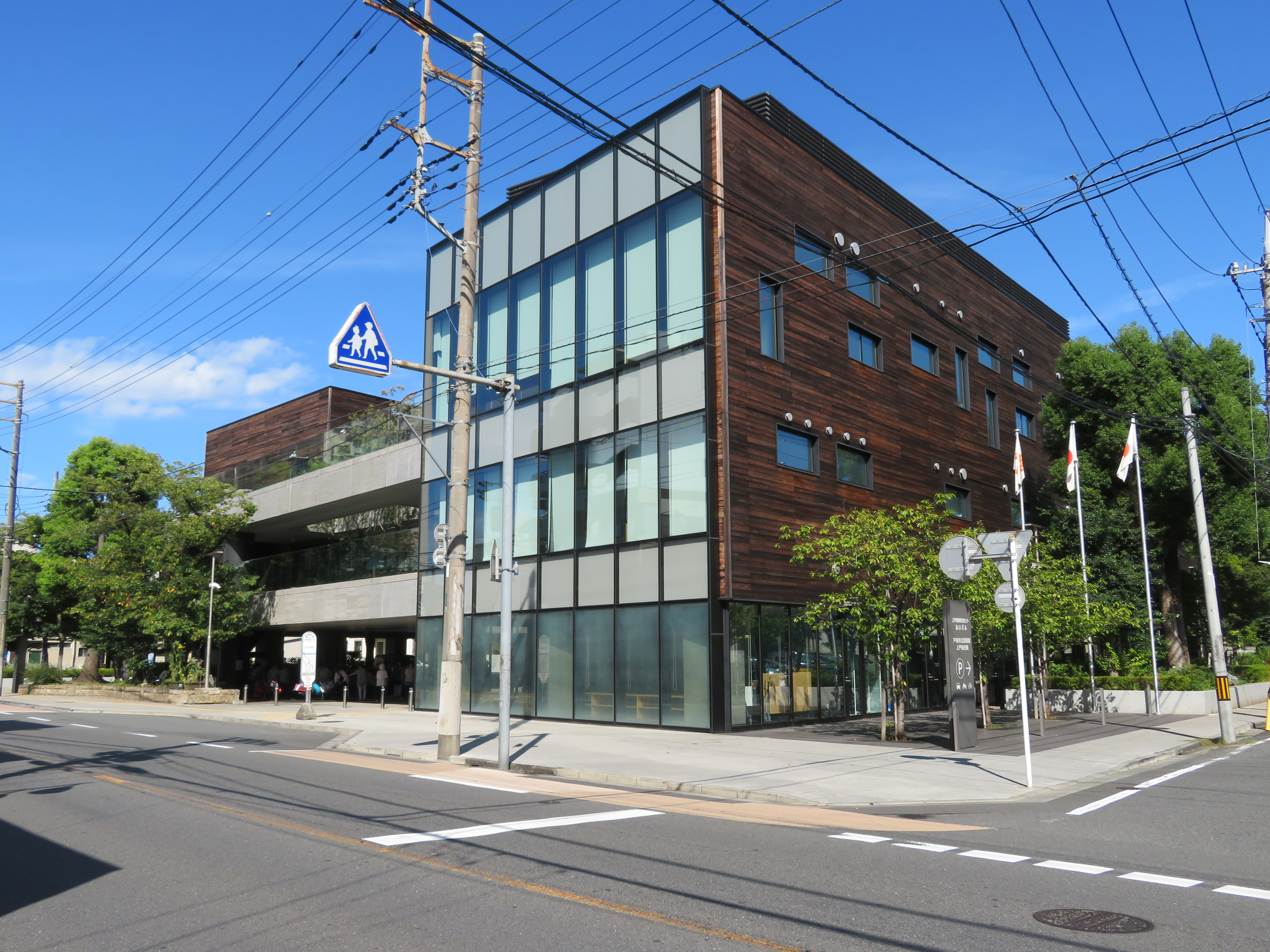 埼玉県戸田市に所在する戸田市上戸田地域交流センター(あいパル) Canon PowerShot SX720 HS